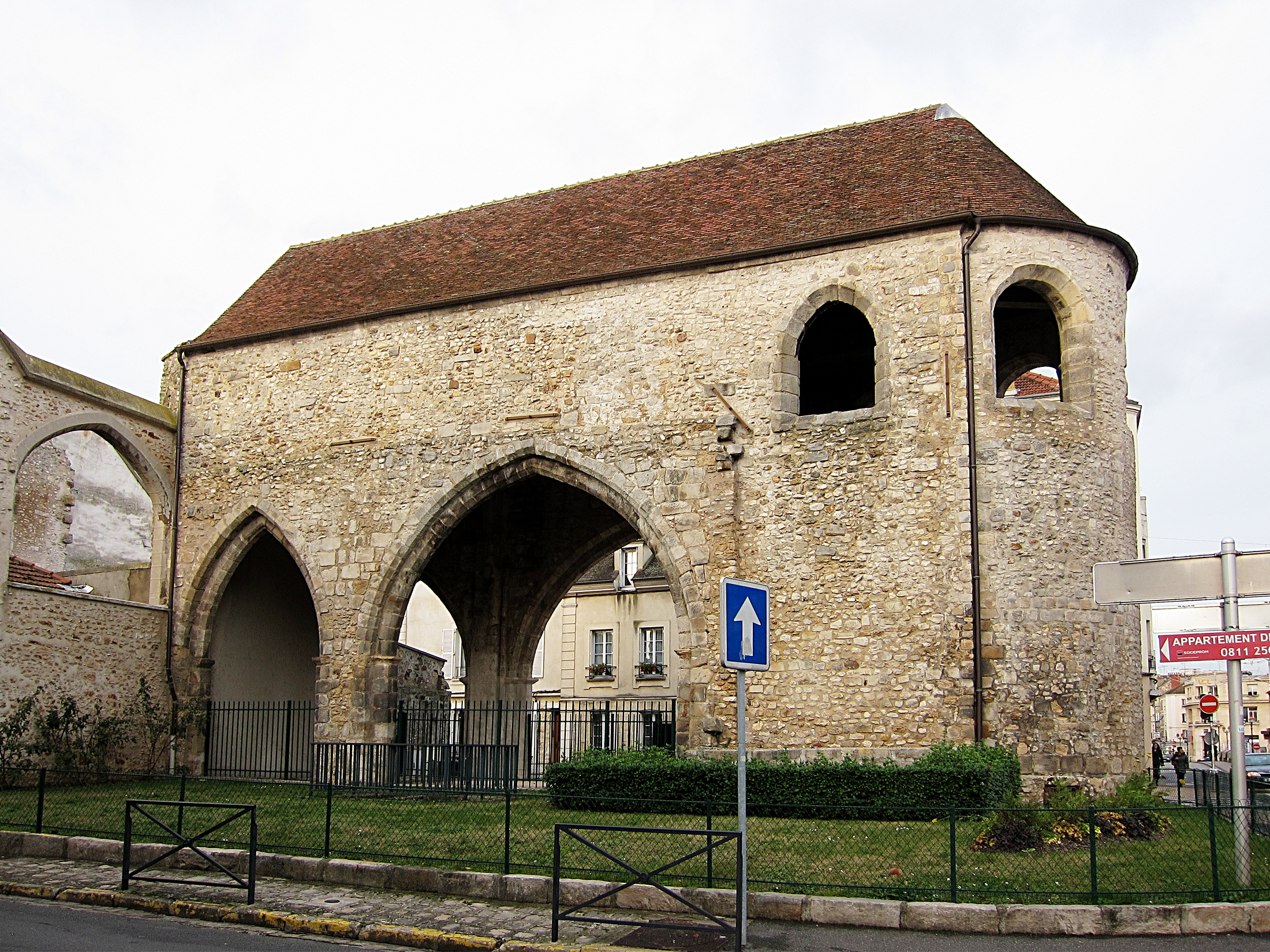 Le prieuré Saint Sauveur à Melun.